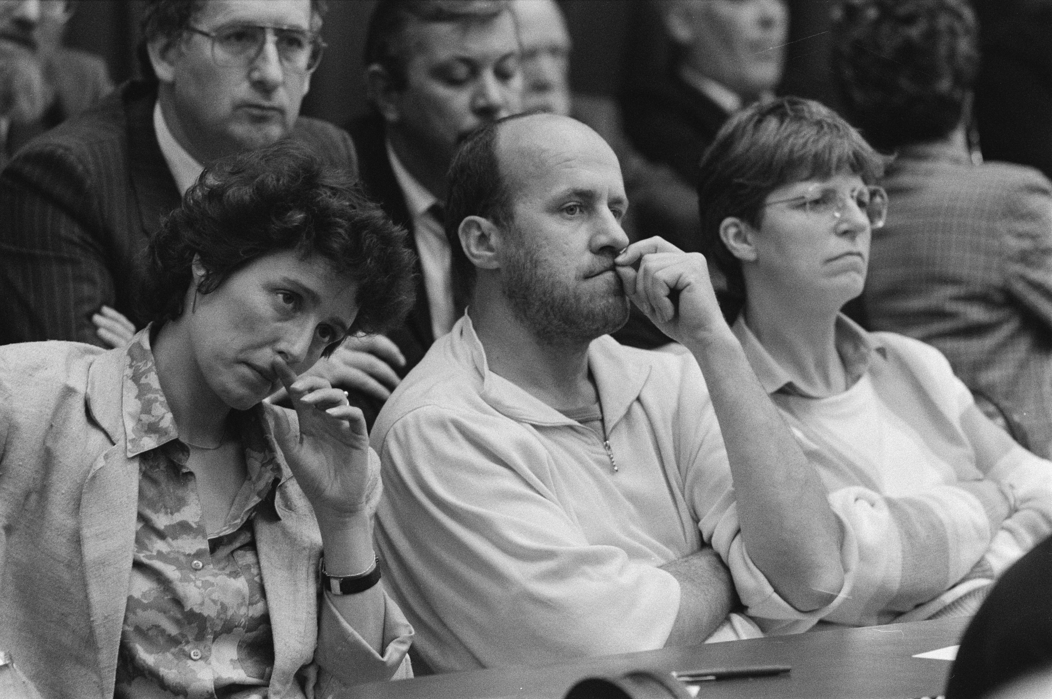 Collectie / Archief : Fotocollectie Anefo Reportage / Serie : [ onbekend ] Beschrijving : Afscheid vertrekkende Tweede Kamerleden in Den Haag ; vlnr: Ina Brouwer , Marius Ernsting , Evelien Eshuys de CPN Datum : 2 juni 1986 Locatie : Den Haag, Zuid-Holland Trefwoorden : AFSCHEID Persoonsnaam : Evelien Eshuys, Ina Brouwer Instellingsnaam : CPN, Tweede Kamer Fotograaf : Fotograaf Onbekend / Anefo Auteursrechthebbende : Nationaal Archief Materiaalsoort : Negatief (zwart/wit) Nummer archiefinventaris : bekijk toegang 2.24.01.05 Bestanddeelnummer : 933-6731